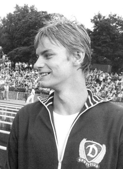 Jörg Woithe